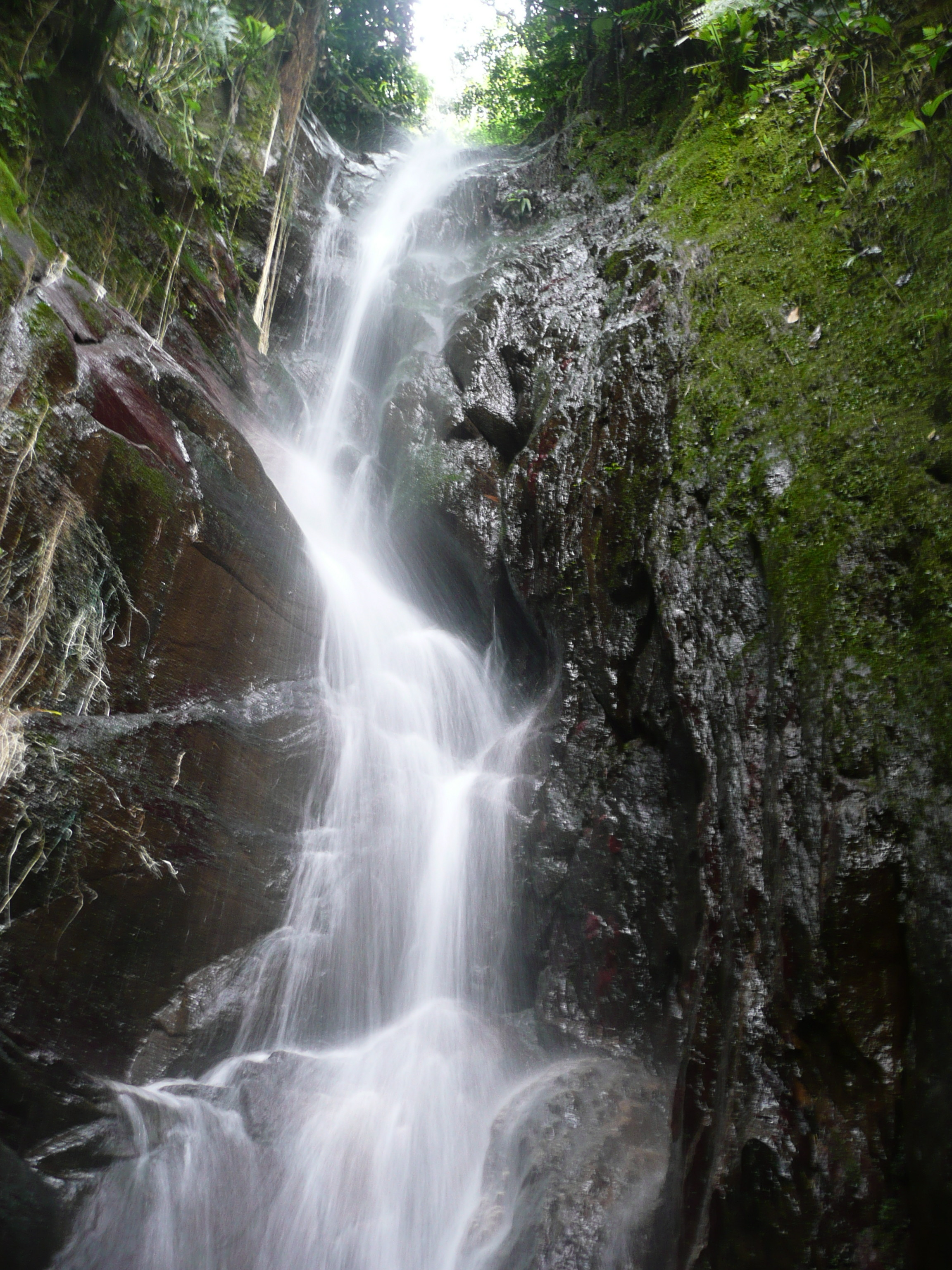 Carretera Maracay-Ocumare de la Costa. Parque Nacional Henri Pittier, Estado Aragua, Venezuela.